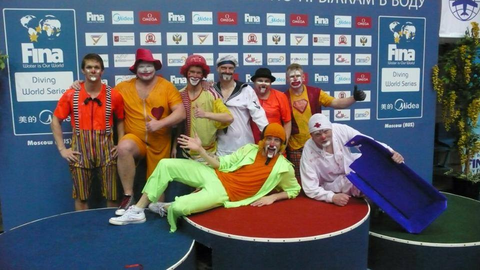 Jerobeam Salakyttä Team Moskovassa 2013